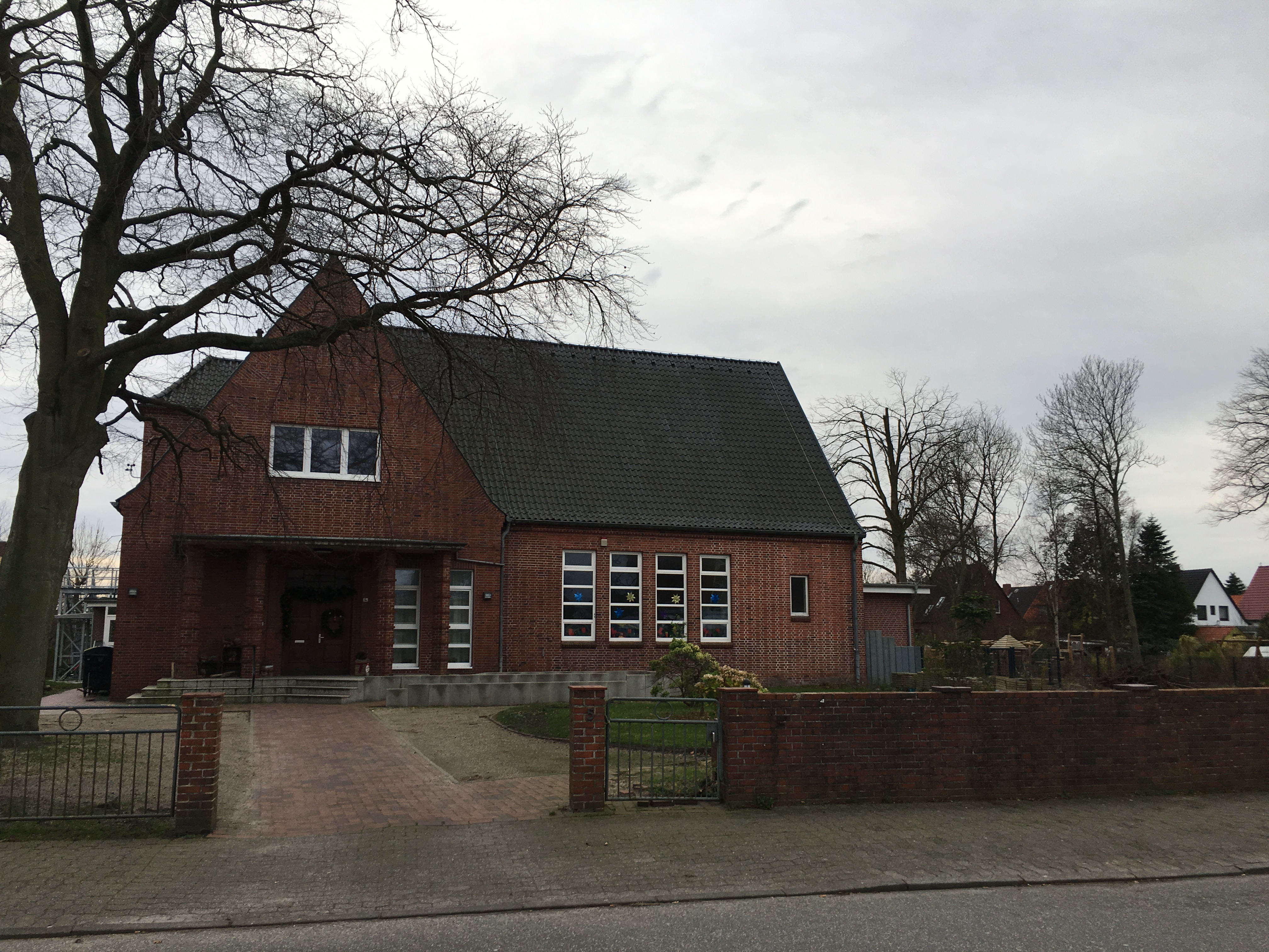 Gebüüd bi de Kark in Döös (Cuxhoben)